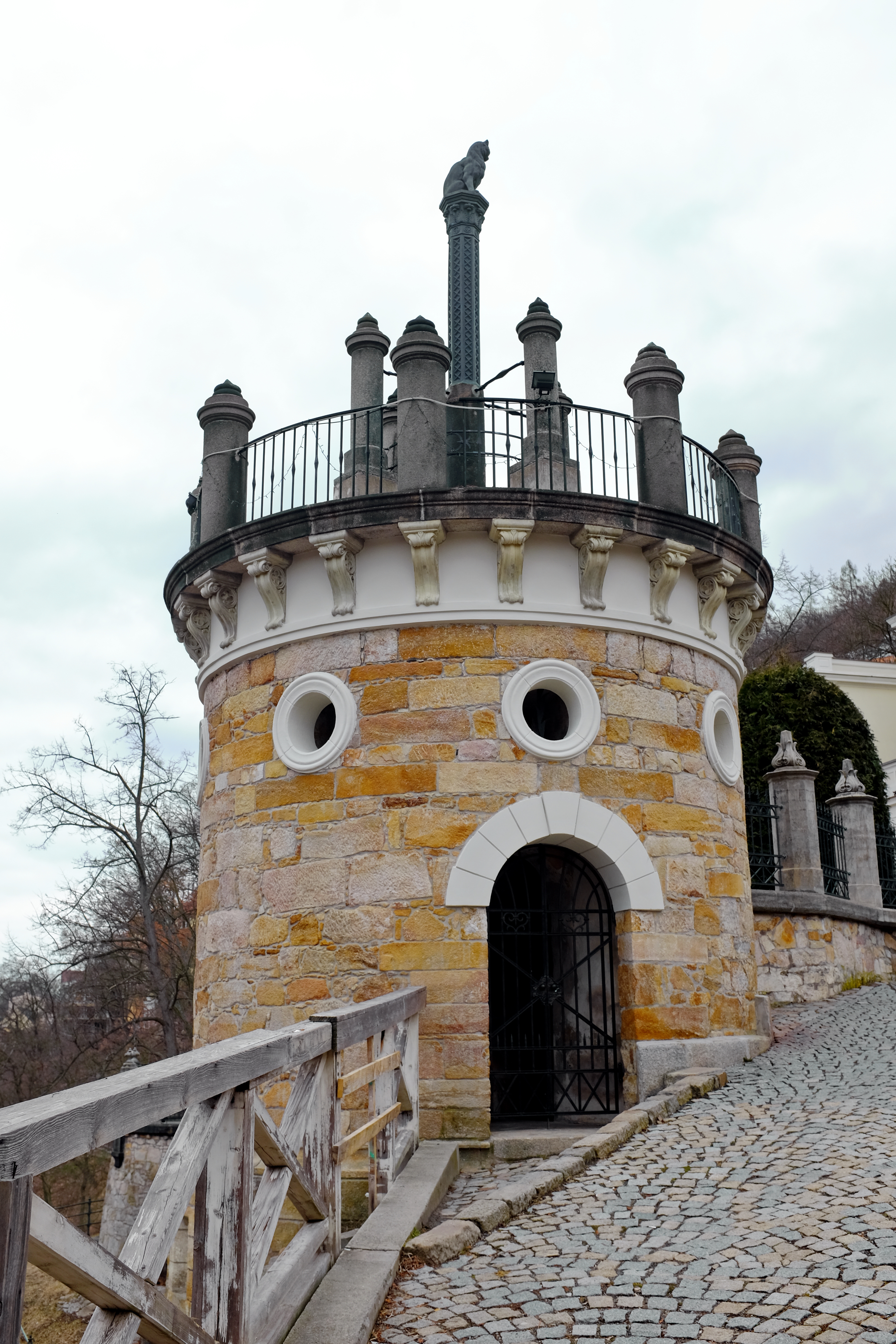 Karlovy Vary rondel se sochou kočky u Lützowovy vily, na Stezce Jeana De Carro